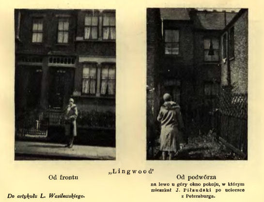 Londyńska siedziba Komitetu Zagranicznego PPS na przedmieściu Leytonstone - tak zwany Lingwood